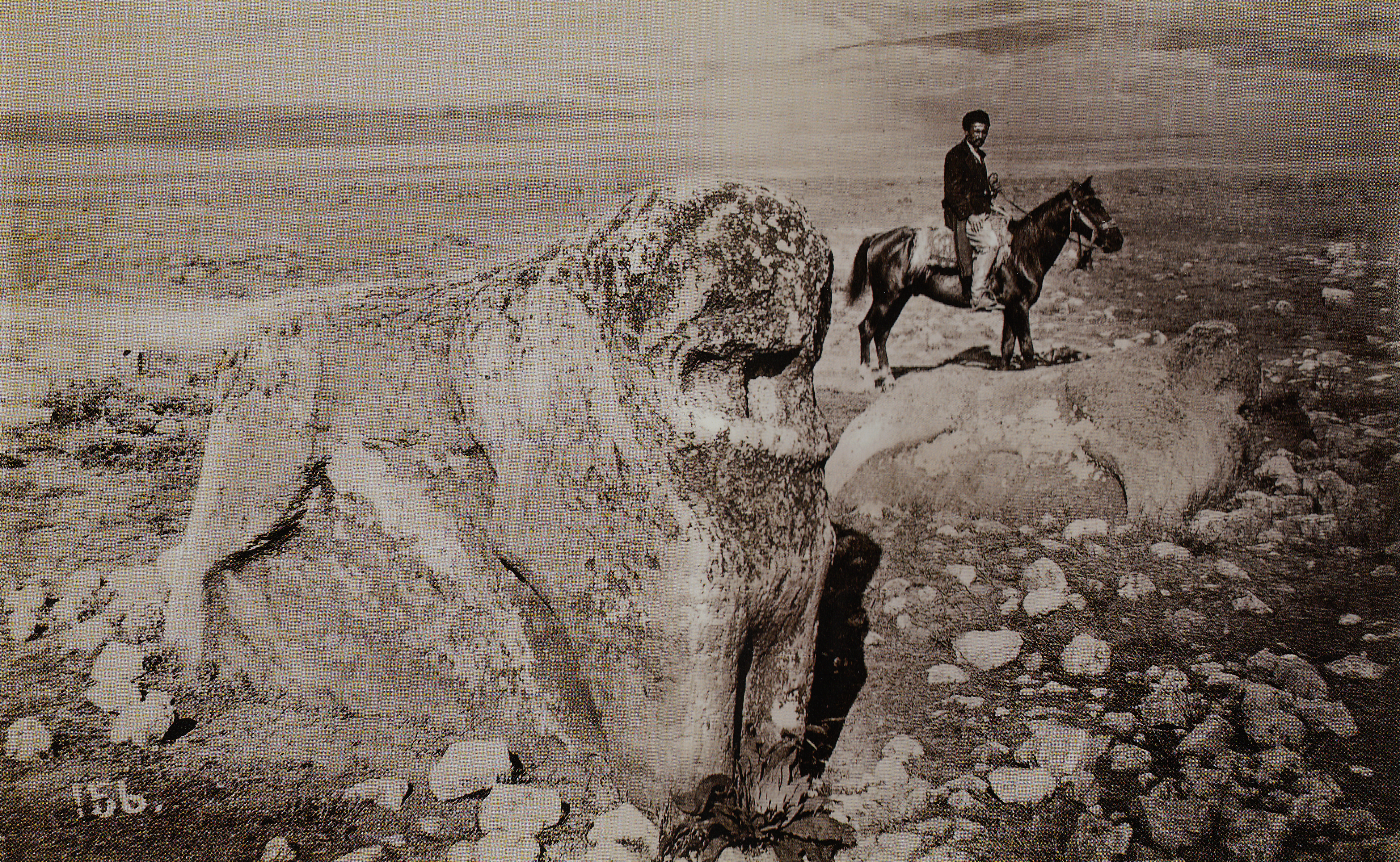 Arslantaş, späthethitische Löwenskulpturen nahe Darende in der türkischen Provinz Malatya, Photographie von John Henry Haynes von 1884